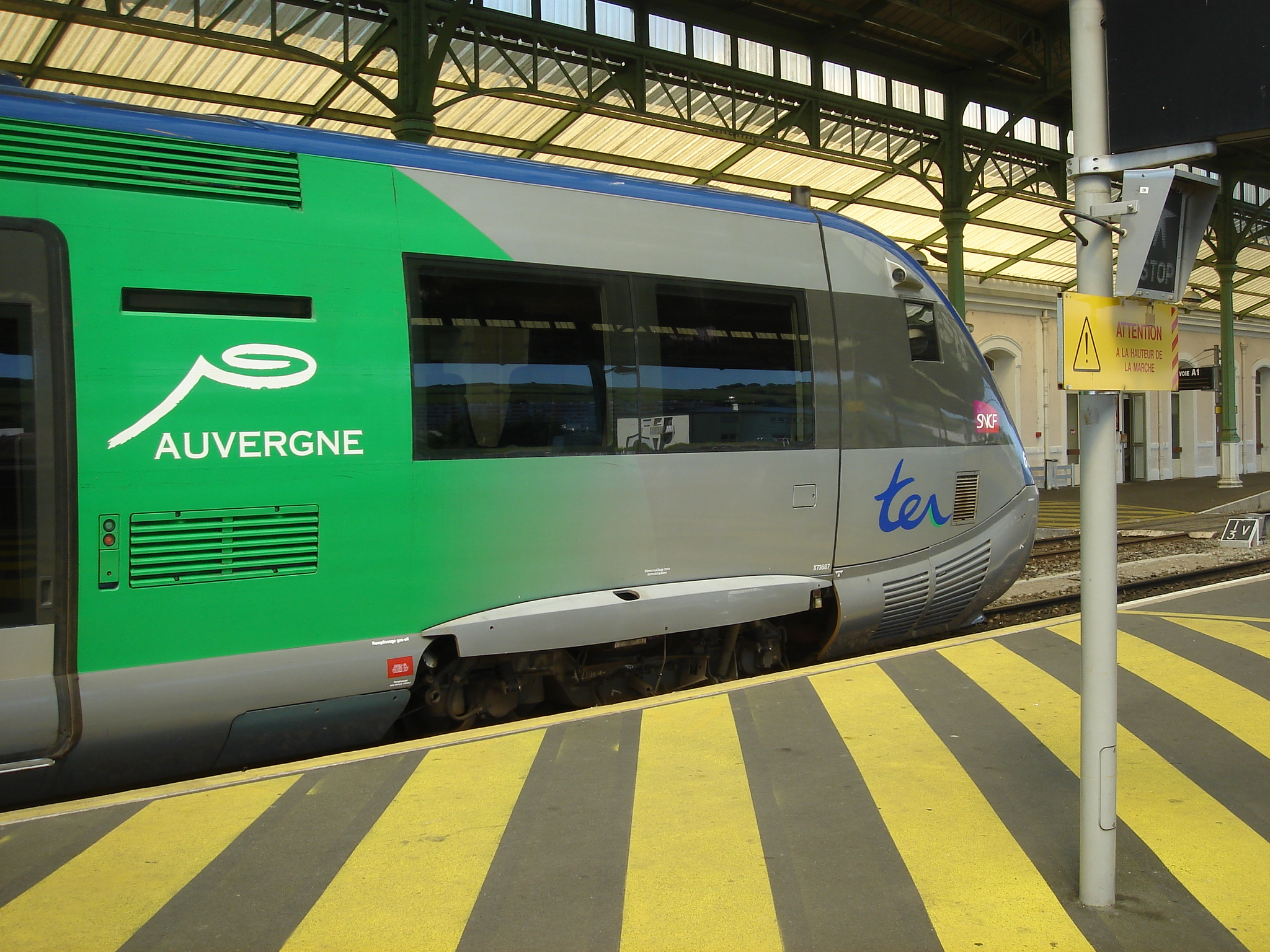 TER Auvergne en gare d'Aurillac.